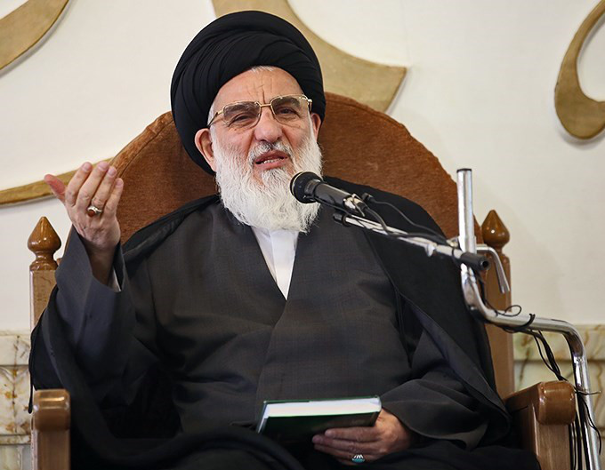 در حال تدریس درس خارج فقه، آرامگاه فاطمه معصومه در قم،اردیبهشت ۱۳۹۴